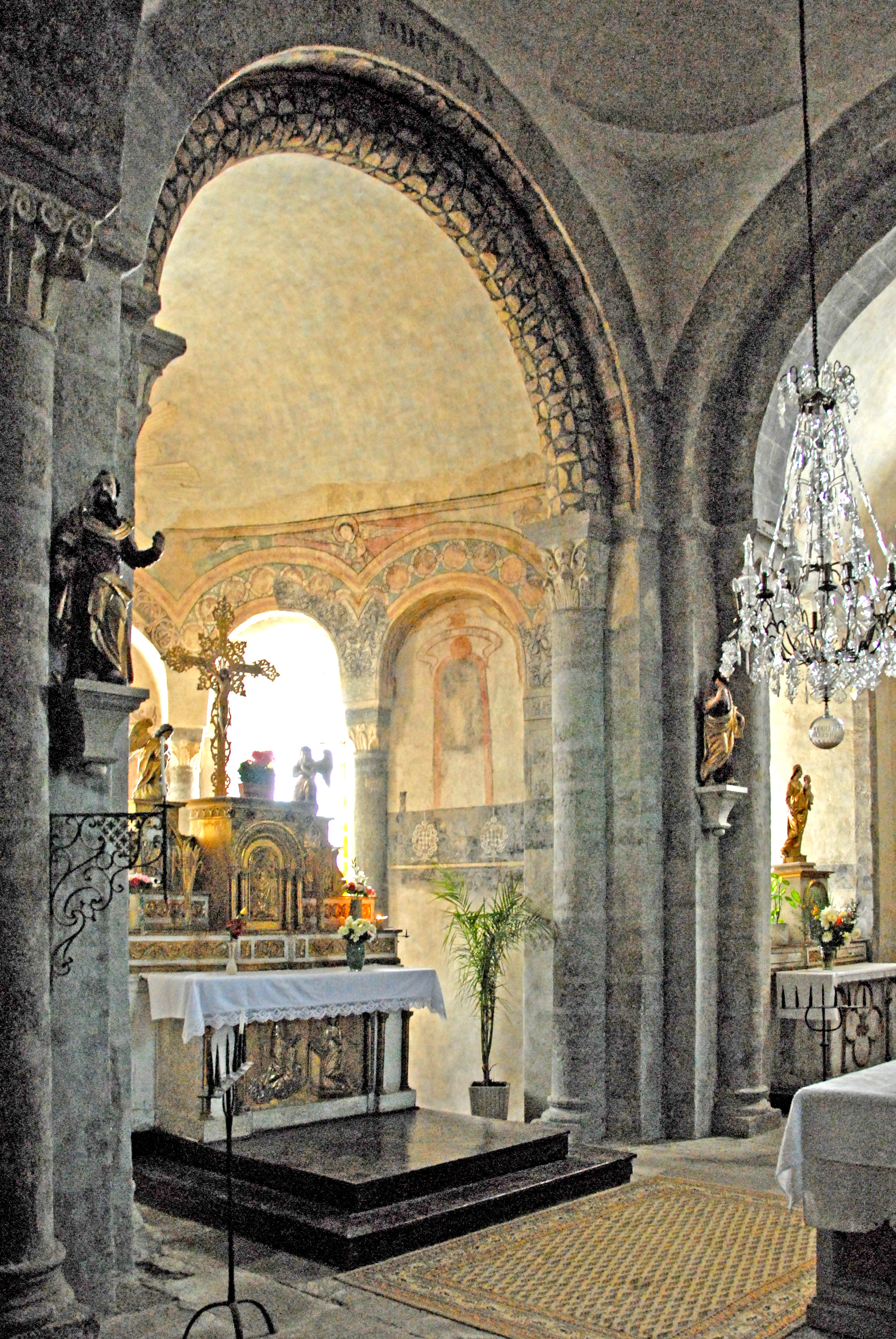 Abteikirche St.-André Lavaudieu, Triumphbogen zum Chor